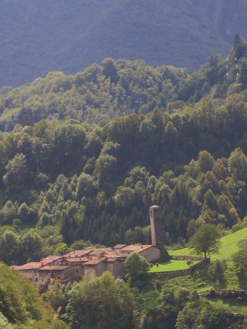 Cornello dei Tasso, Camerata Cornello, Bergamo, Italy